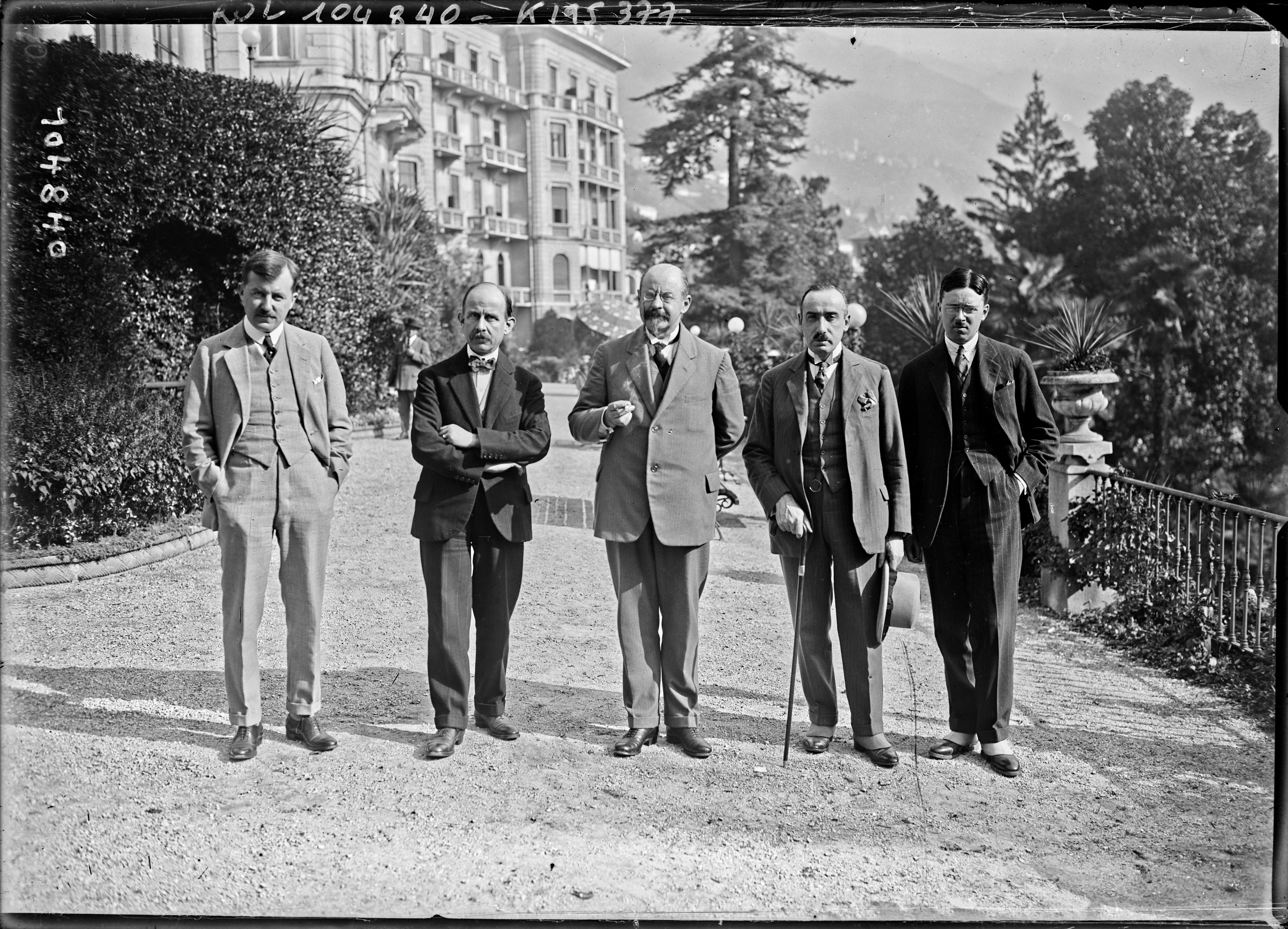 (De g. à d. Henri) Rolin, (Joseph de) Ruelle, Vandervelde, baron (Pierre van) Zuylen, (comte) Ferdinand du Chastel (délégation belge à Locarno, 7 octobre 1925) - (photographie de presse) - (Agence Rol)